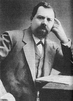 Вавилов, Иван Ильич — купец, общественный деятель, отец Николая и Сергея Вавиловых